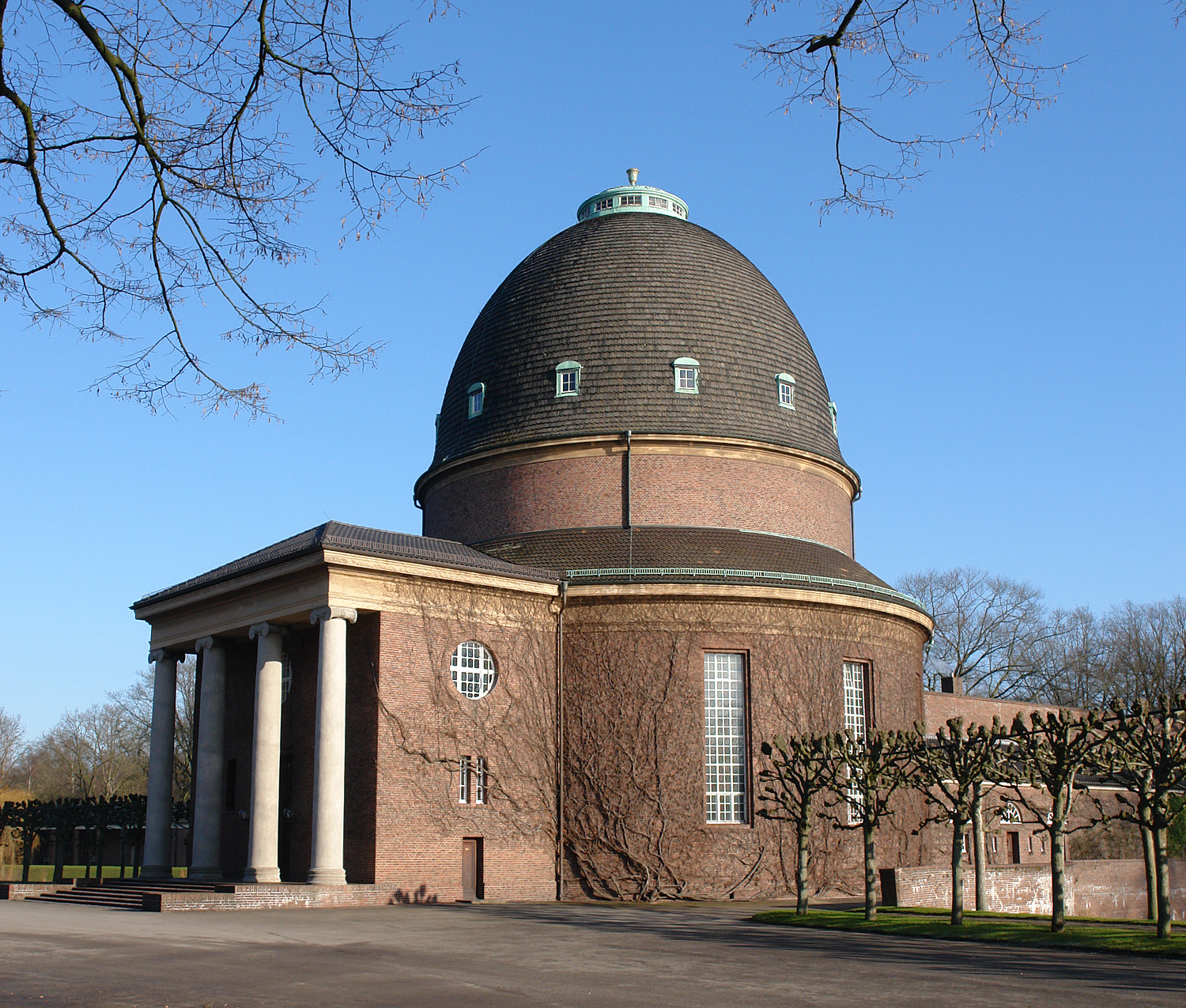 Kapelle des Osterholzer Friedhofs in Bremen